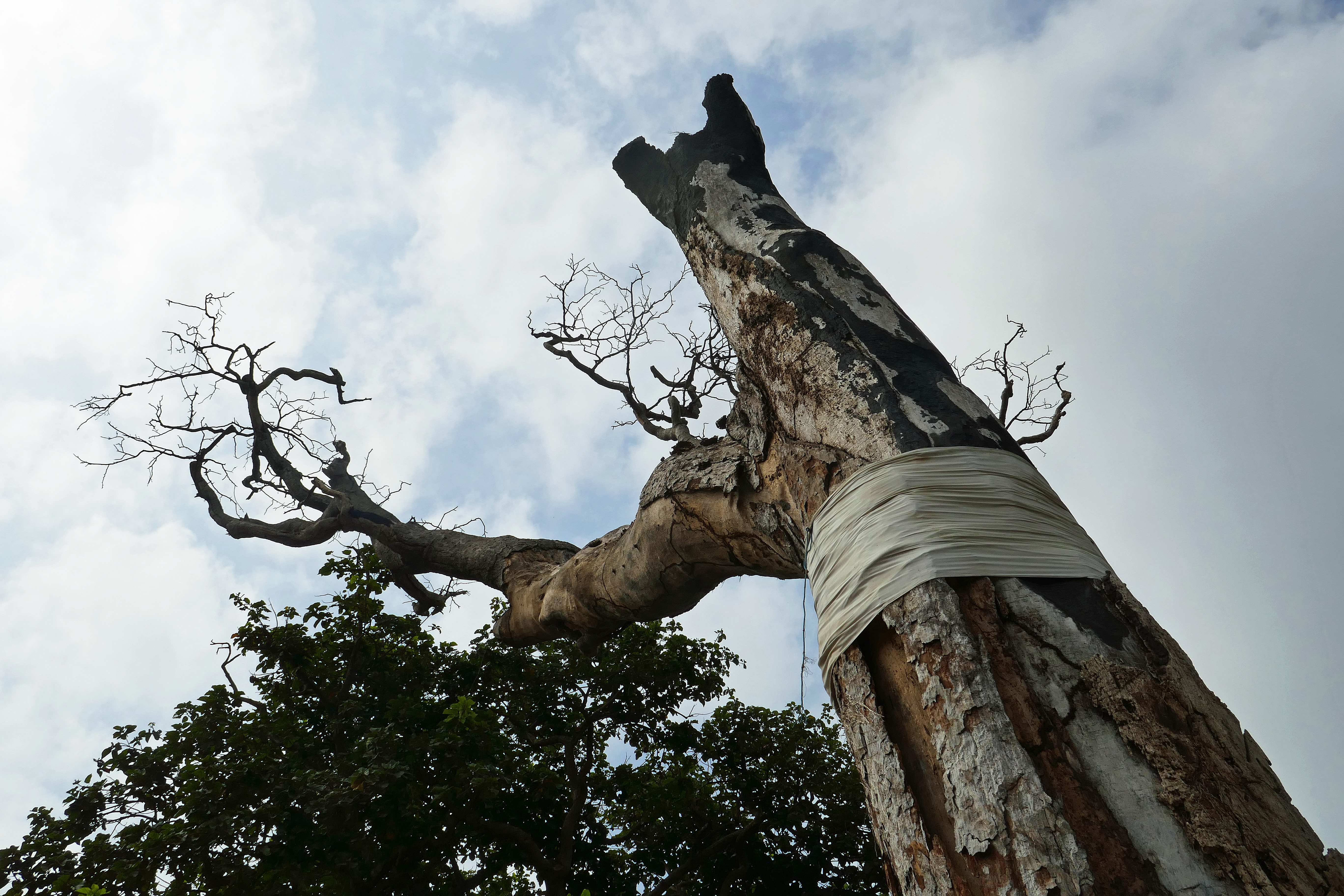 Iroko (Milicia excelsa) sacré, ceint d'un linge blanc, au Temple des Pythons de Ouidah (Bénin).